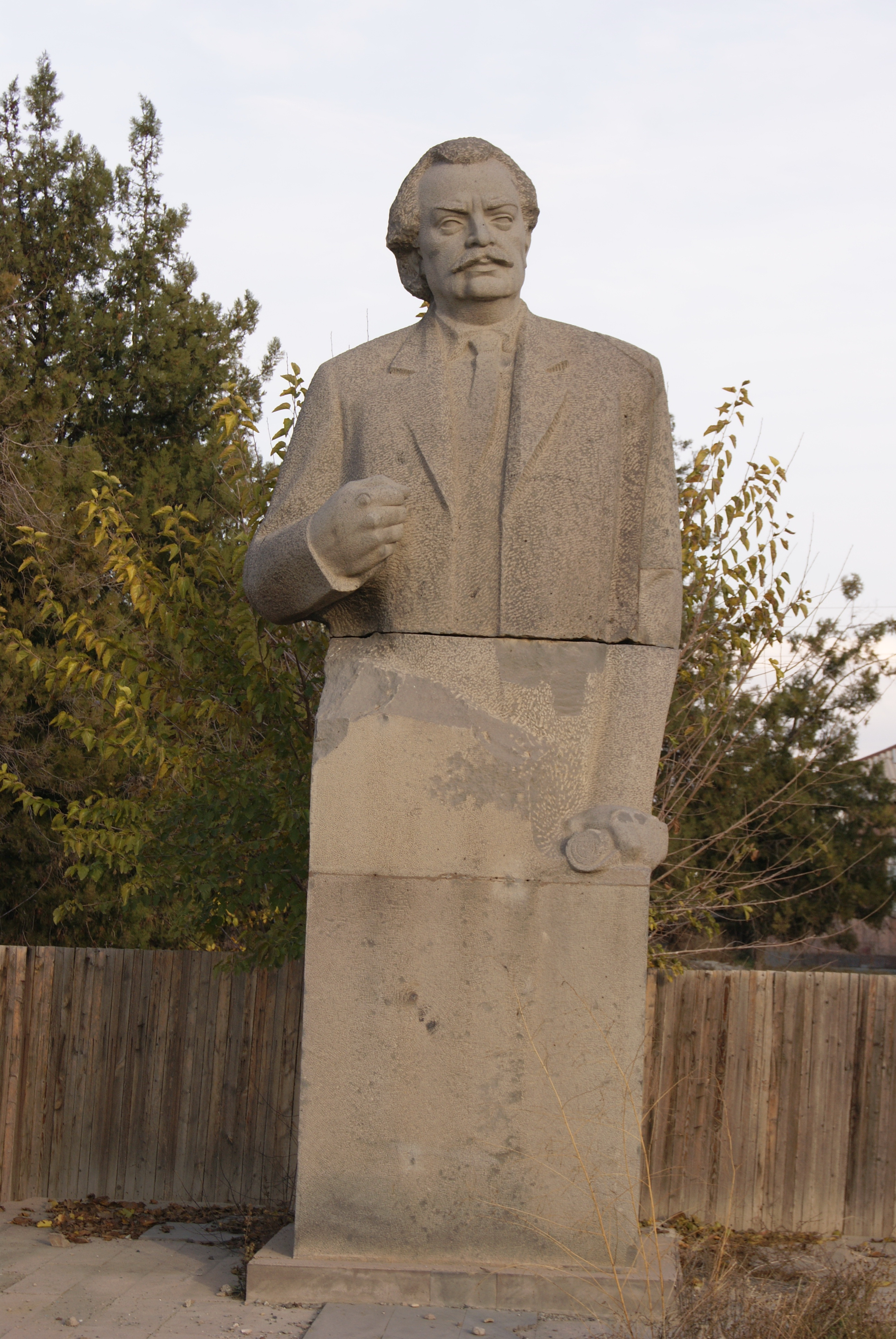 Գտնվում է Արարատի մարզի Դիմիտրով գյուղում 38/3